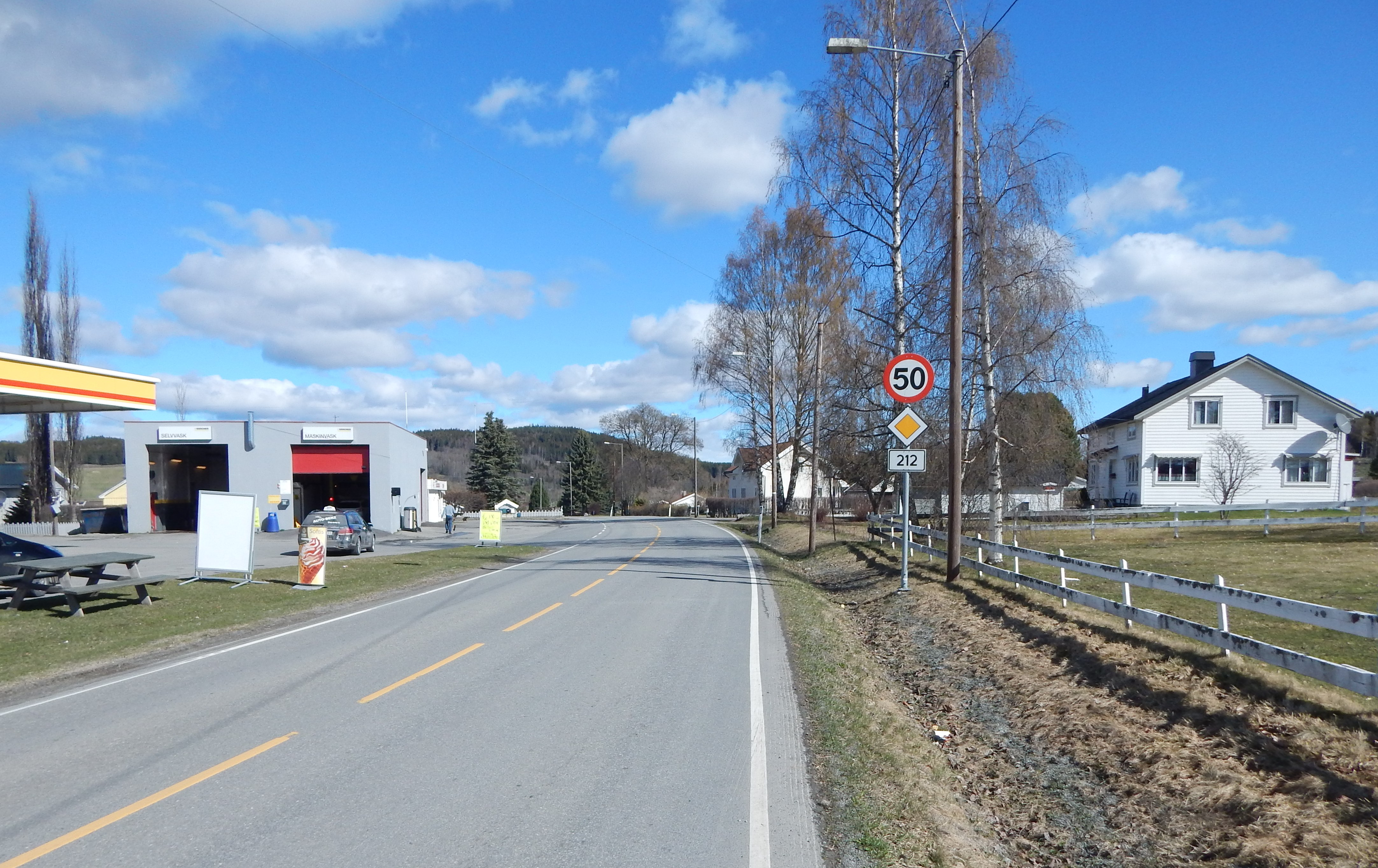 Primær fylkesvei 212 ved Stavsjø